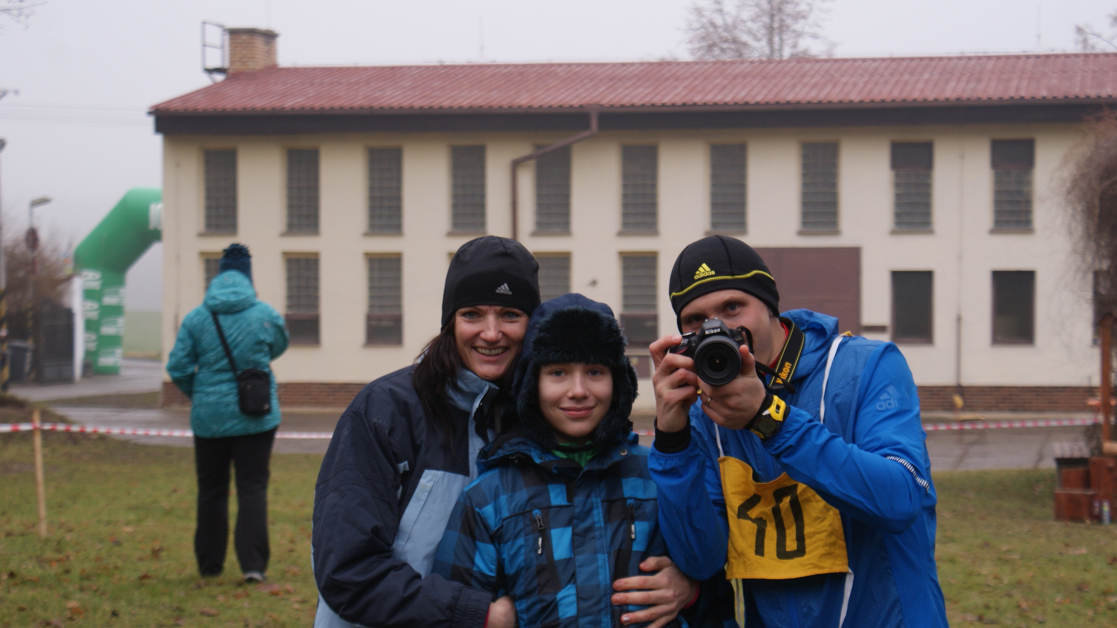 Zimní běh Litní - rodina fotografuje 18. 1. 2014